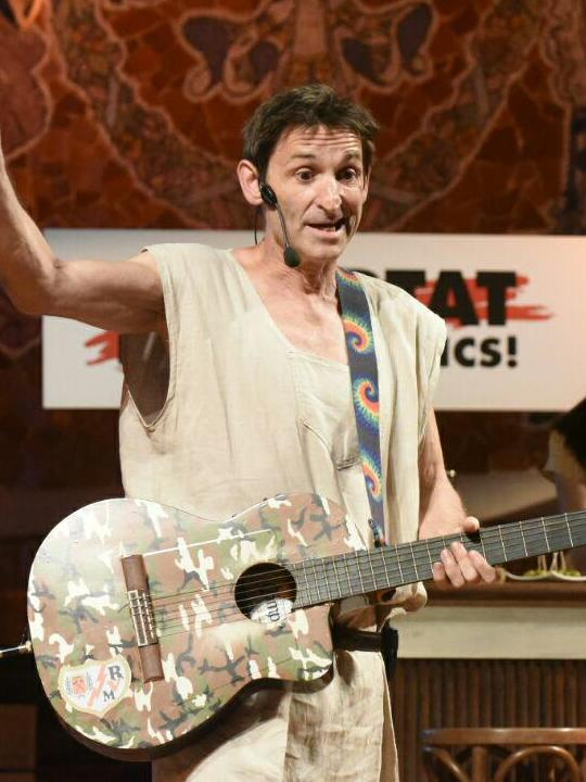 Quim Monzó rep el 50è Premi d'Honor de les Lletres Catalanes al Palau de la Música Catalana el 4 de juny de 2018. Per primera vegada a la història d'Òmnium, el president no pot entregar el guardó al premiat: Jordi Cuixart és a la presó des del 16 d'octubre de 2017.